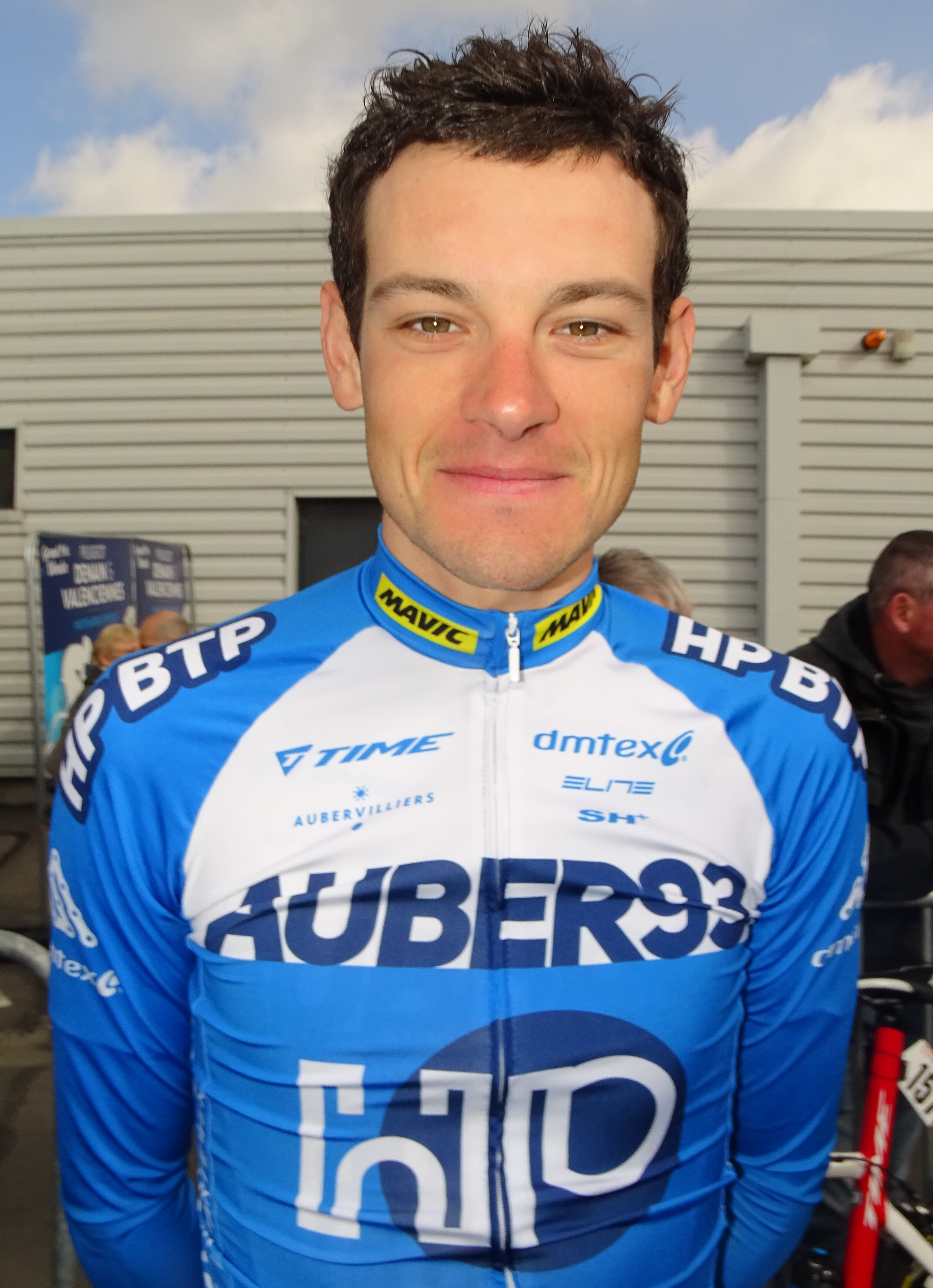 Reportage réalisé le jeudi 13 avril à l'occasion du départ et de l'arrivée du Grand Prix de Denain 2017 à Denain, Nord, Nord-Pas-de-Calais-Picardie, France.